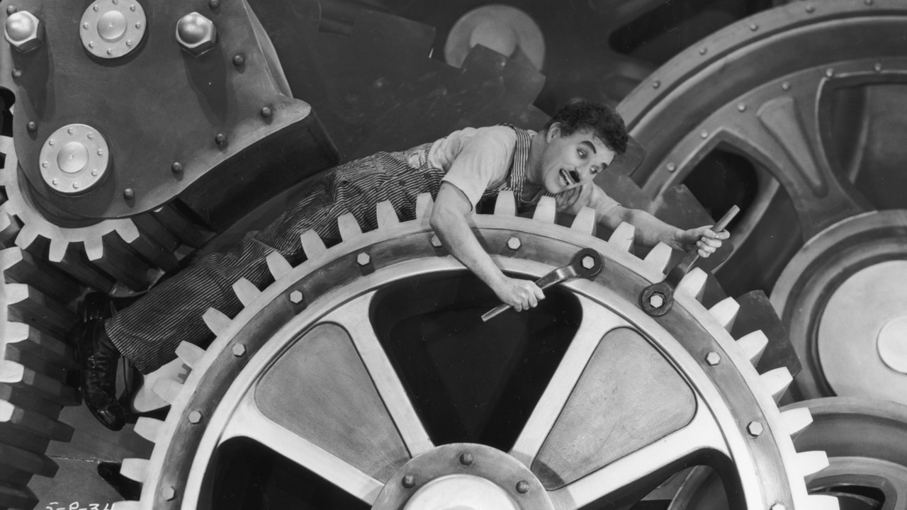 Modern Zamanlar